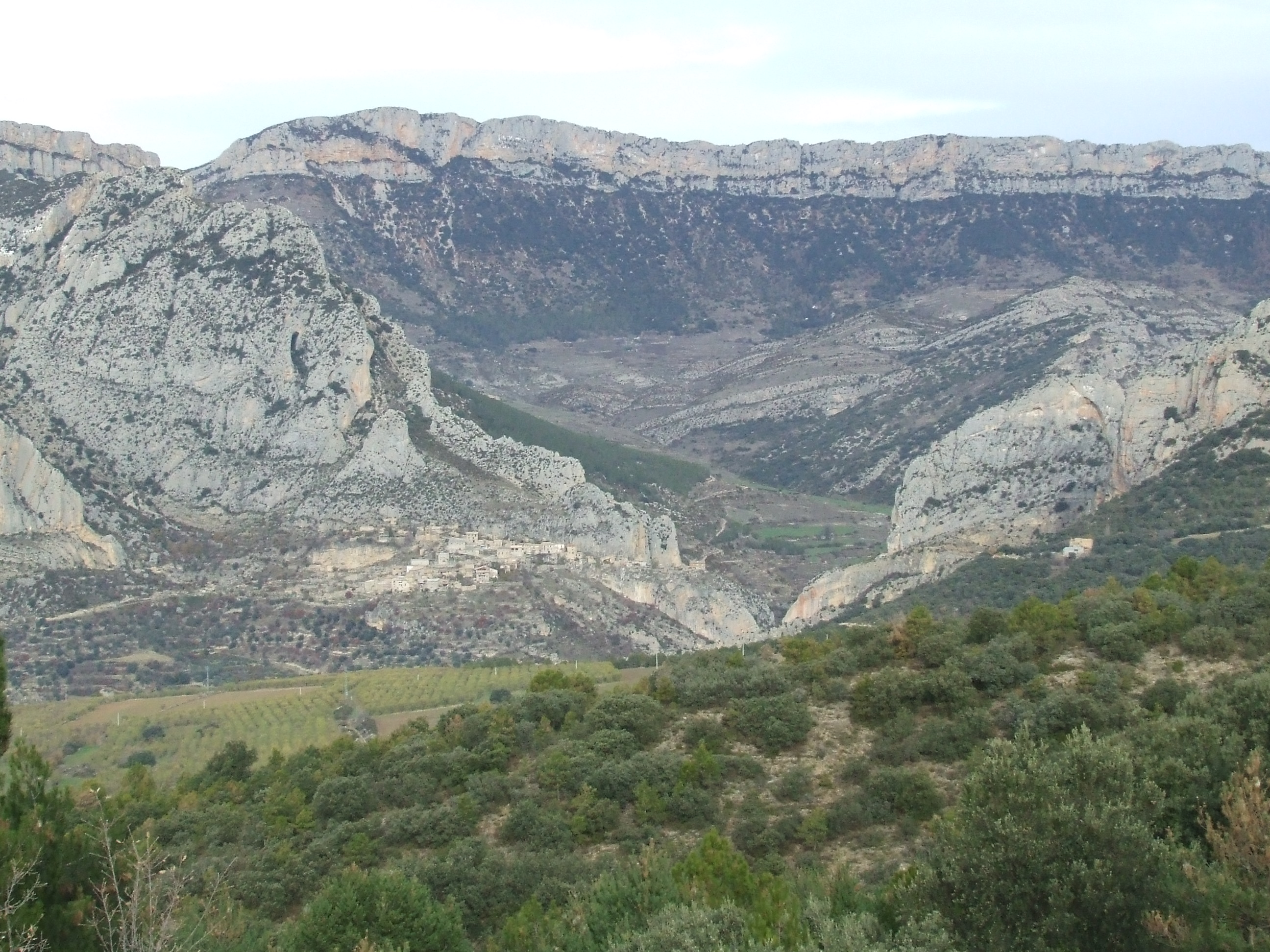 La vall alta del riu d'Abella (Abella de la Conca, Pallars Jussà)